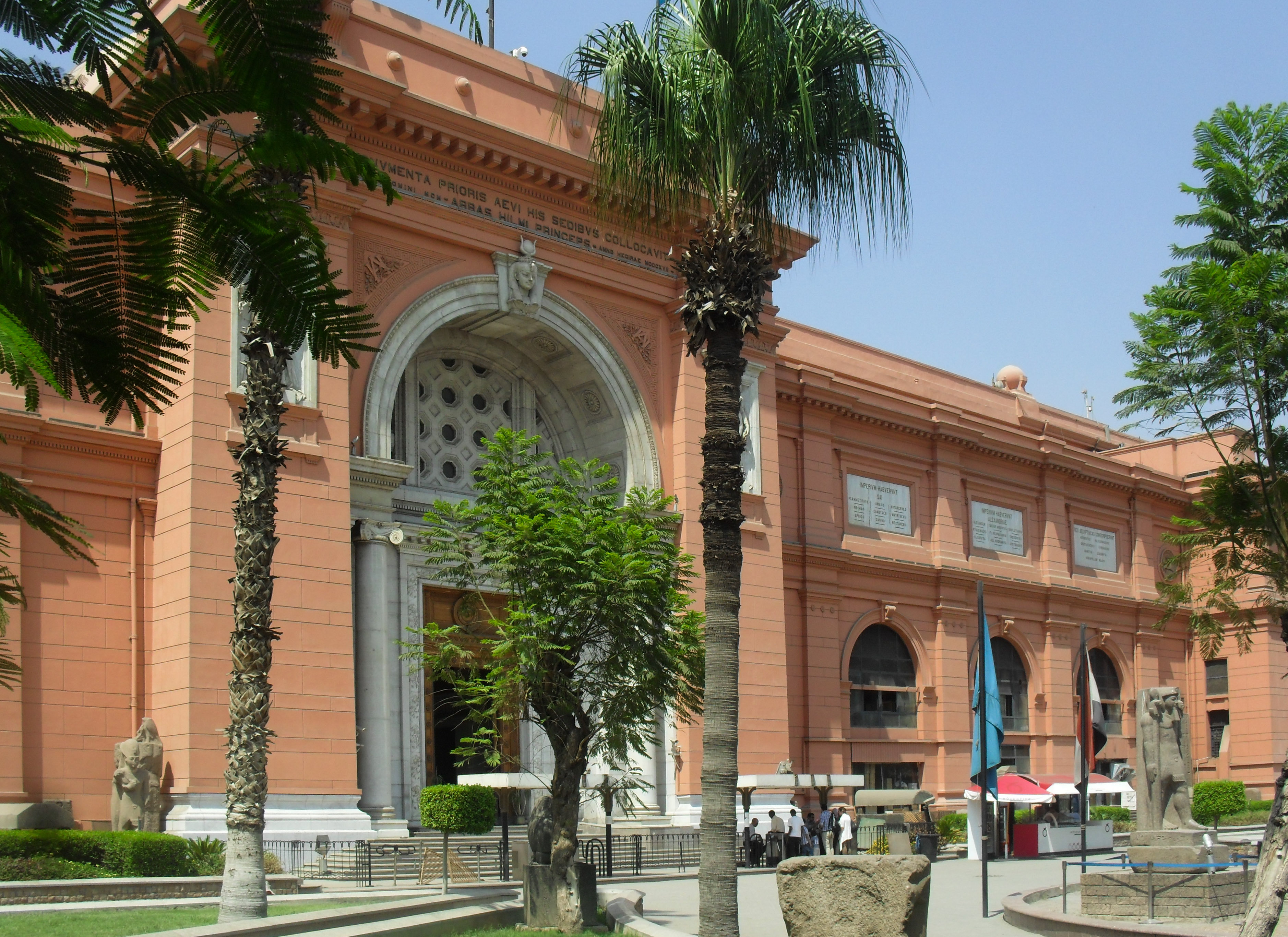 musee egyptien du caire